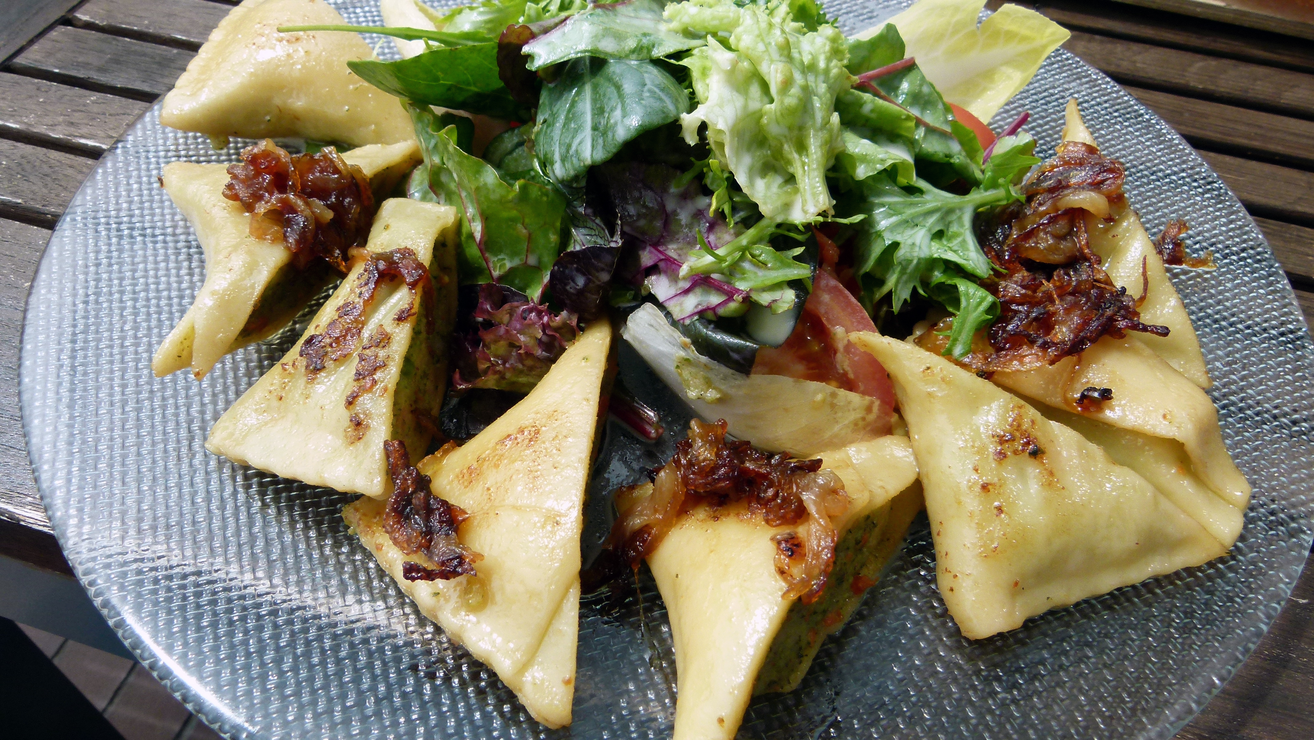 "Badische Maultäschle mit Zwiebelschmelze", Restaurant Hotel am Münster, Breisach